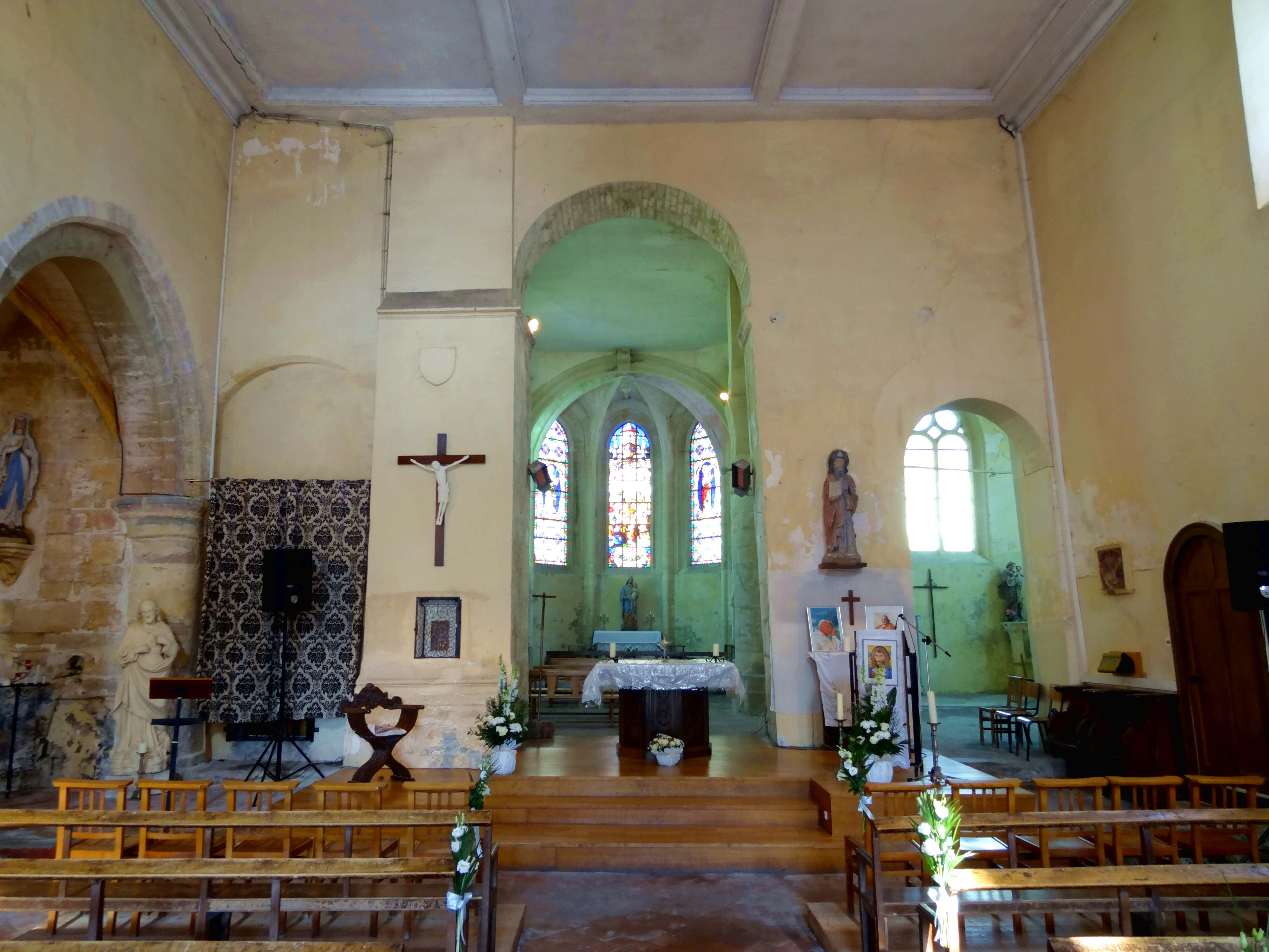 Intérieur de l'église - voir titre.